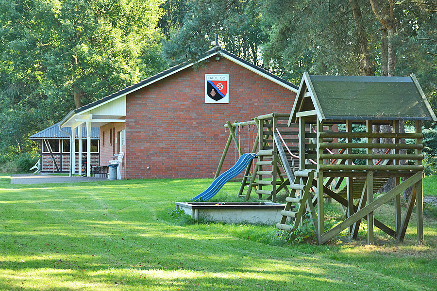 Badenstedt